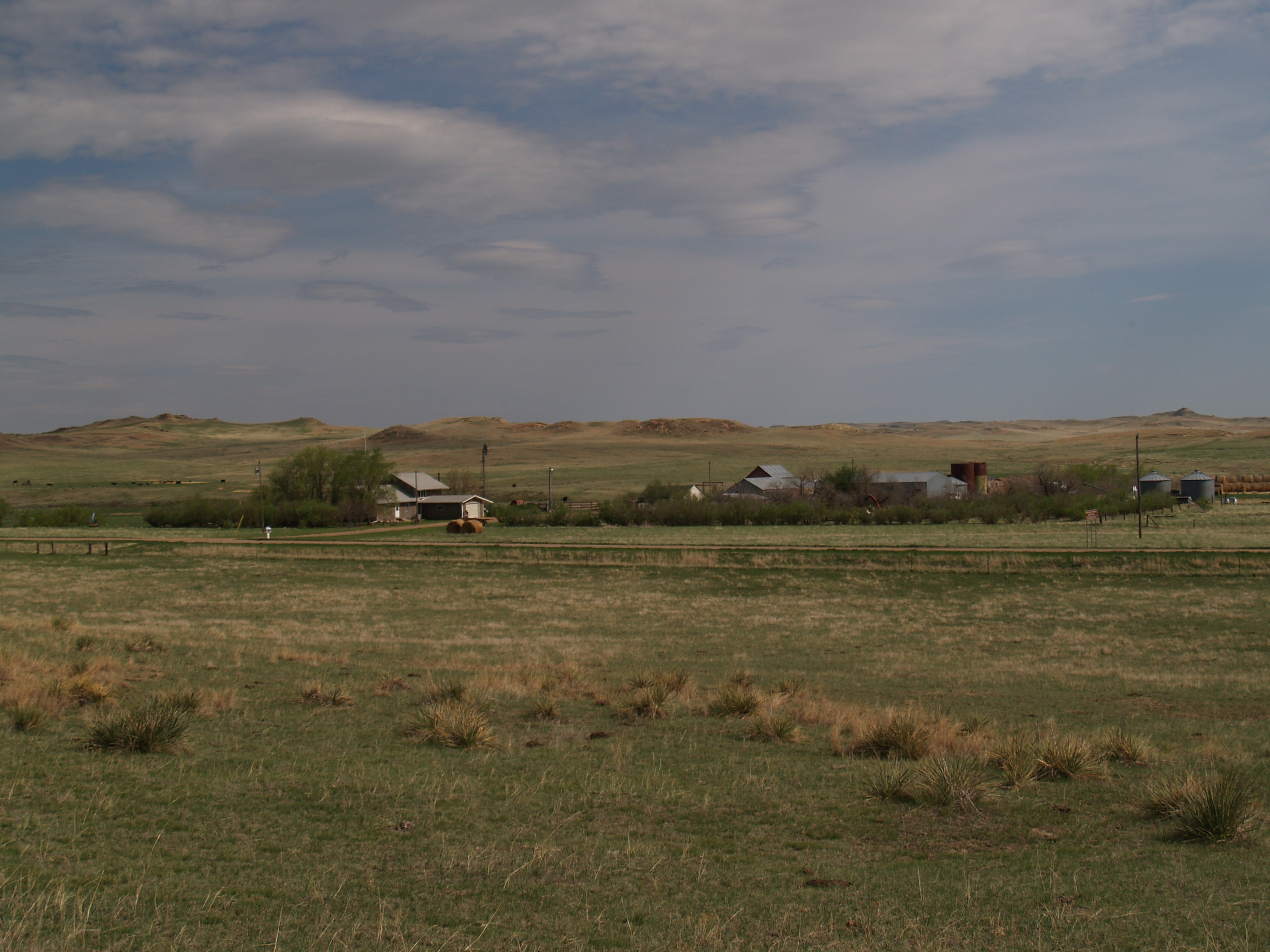 Skaar, North Dakota